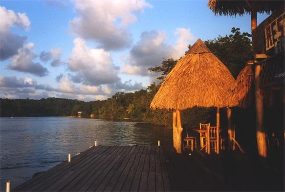 Lago de Izabal en Guatemala